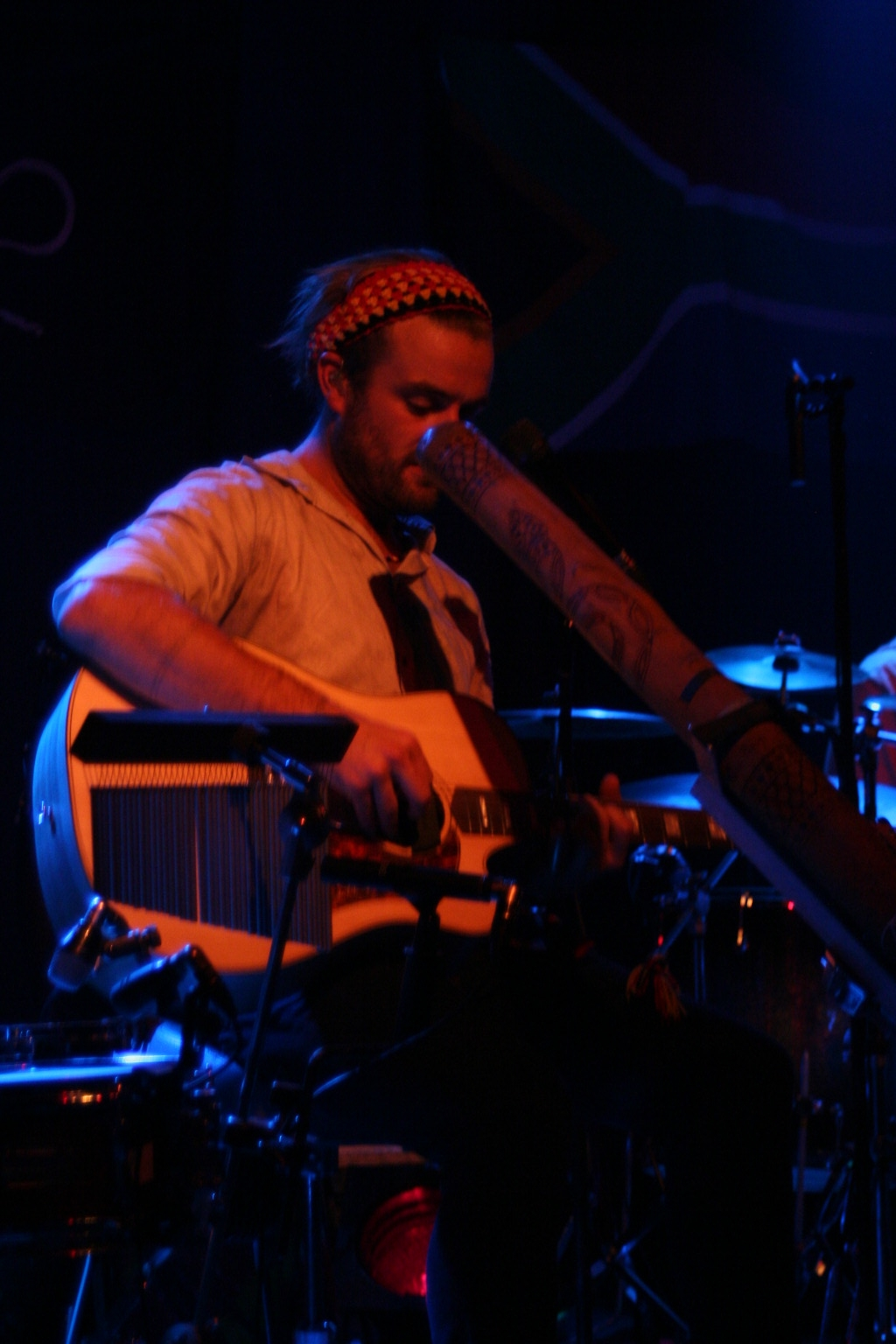 Xavier Rudd at concert, Hamburg 2010/11